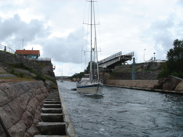 Sotekanaalen, Sotenäs, Sweden